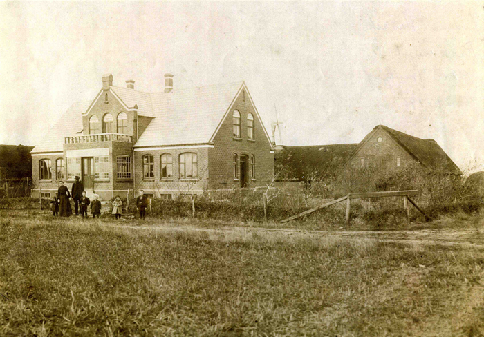 Billede af Kirkeby